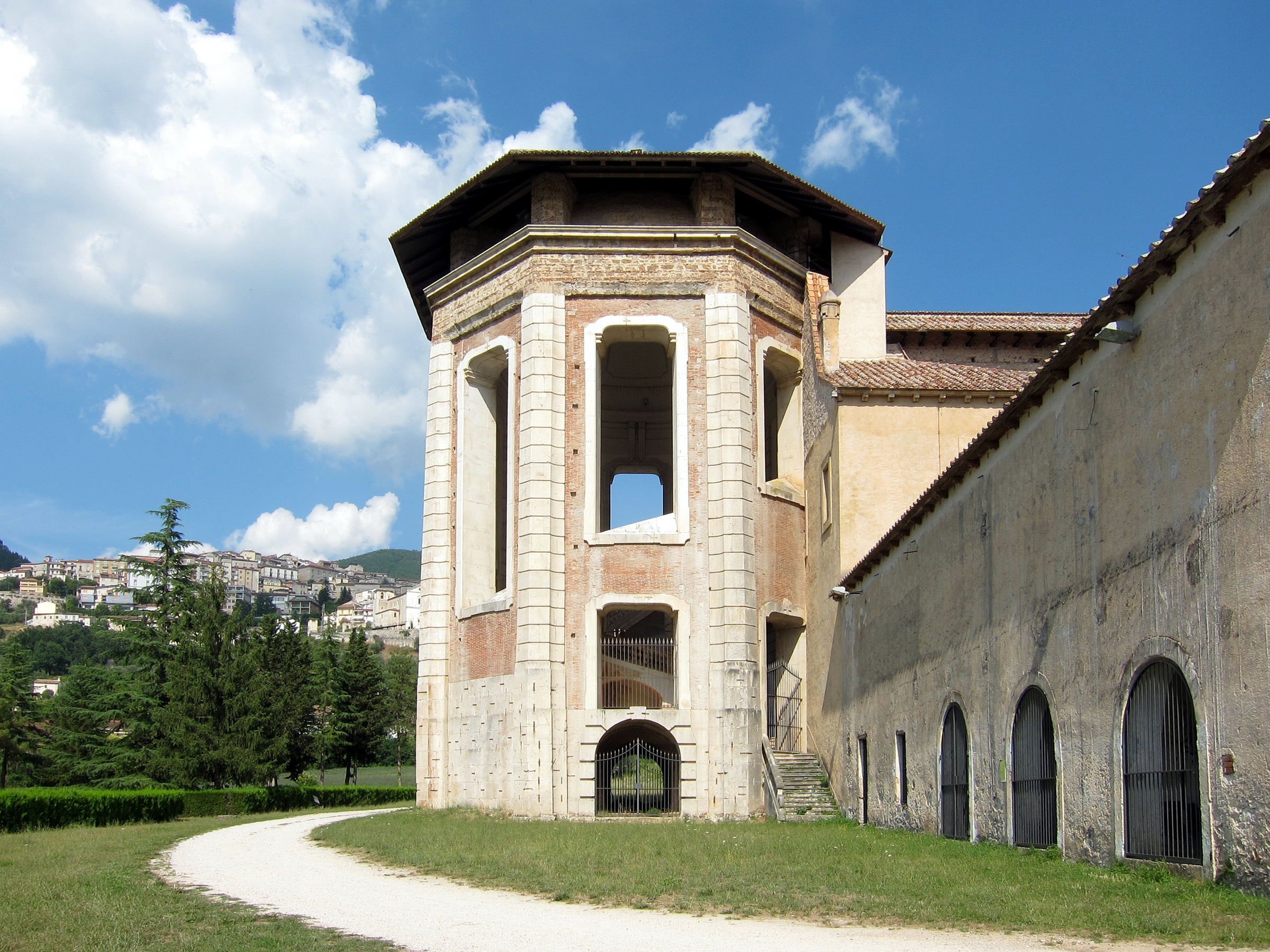 Le grand escalier de la Certosa di San Lorenzo (Padula).